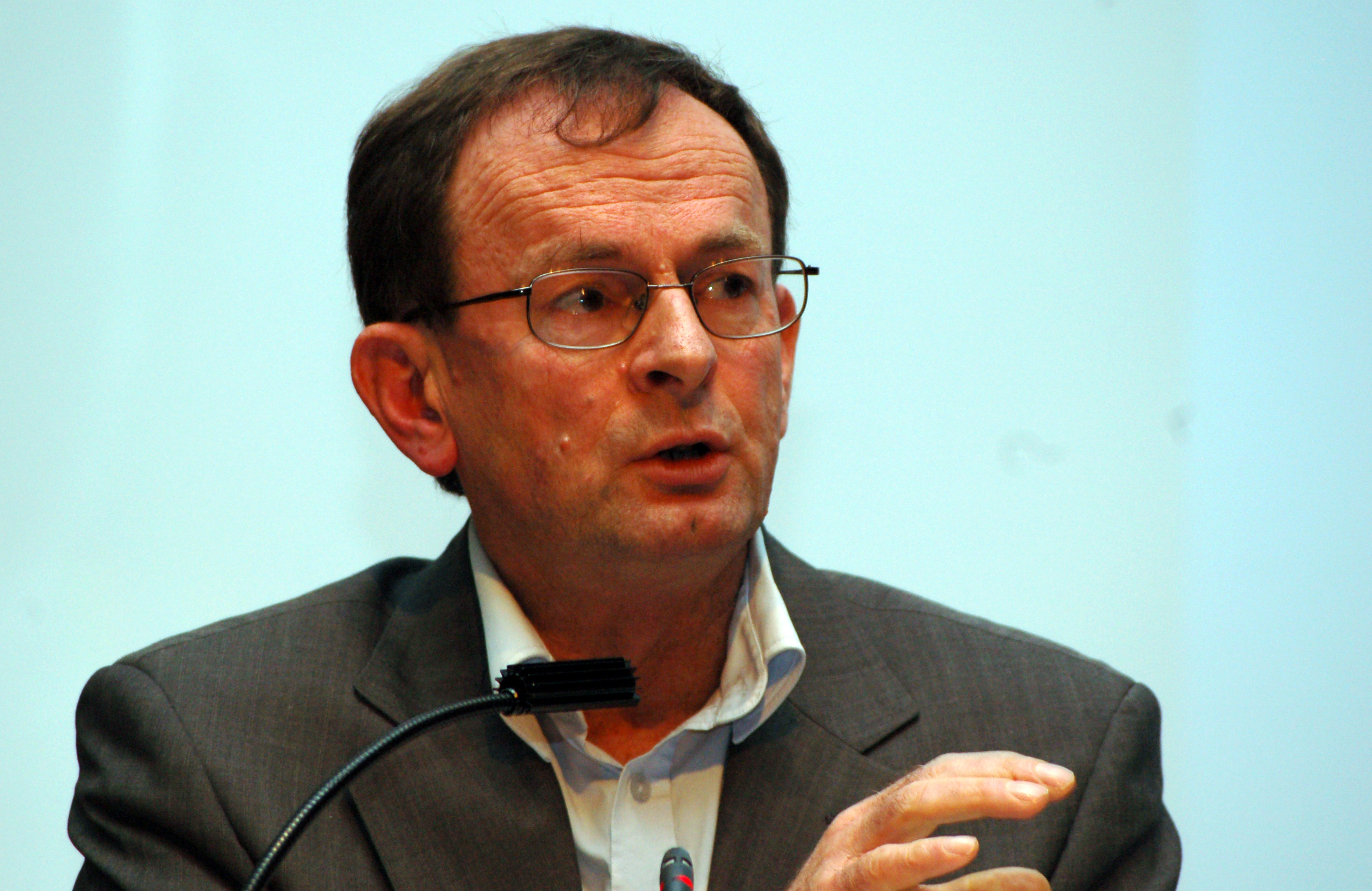 ByrådslederErling Lae i Oslo